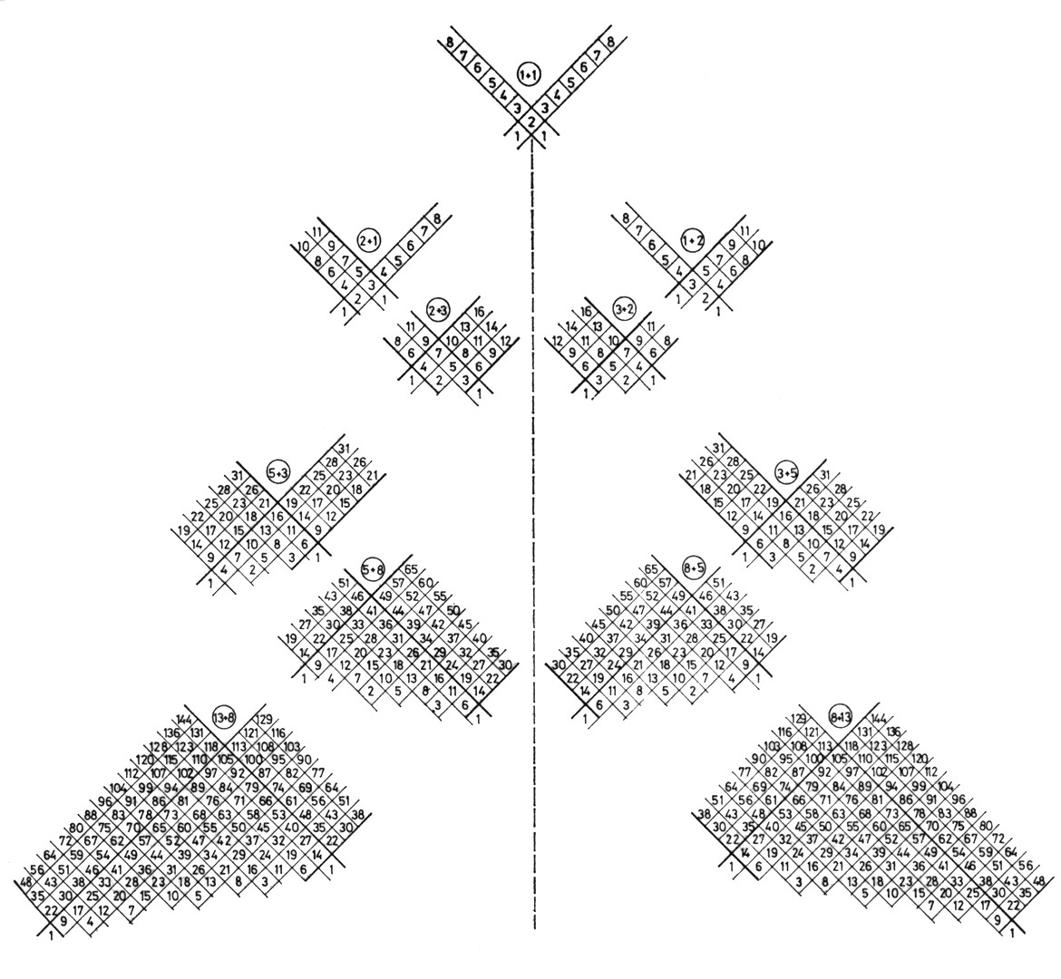 A Fibonacci növények modelljei sorbarendezve enantiomorf párokba, kiindulásul az 1+1-es búzakalász-szimmetriát választva